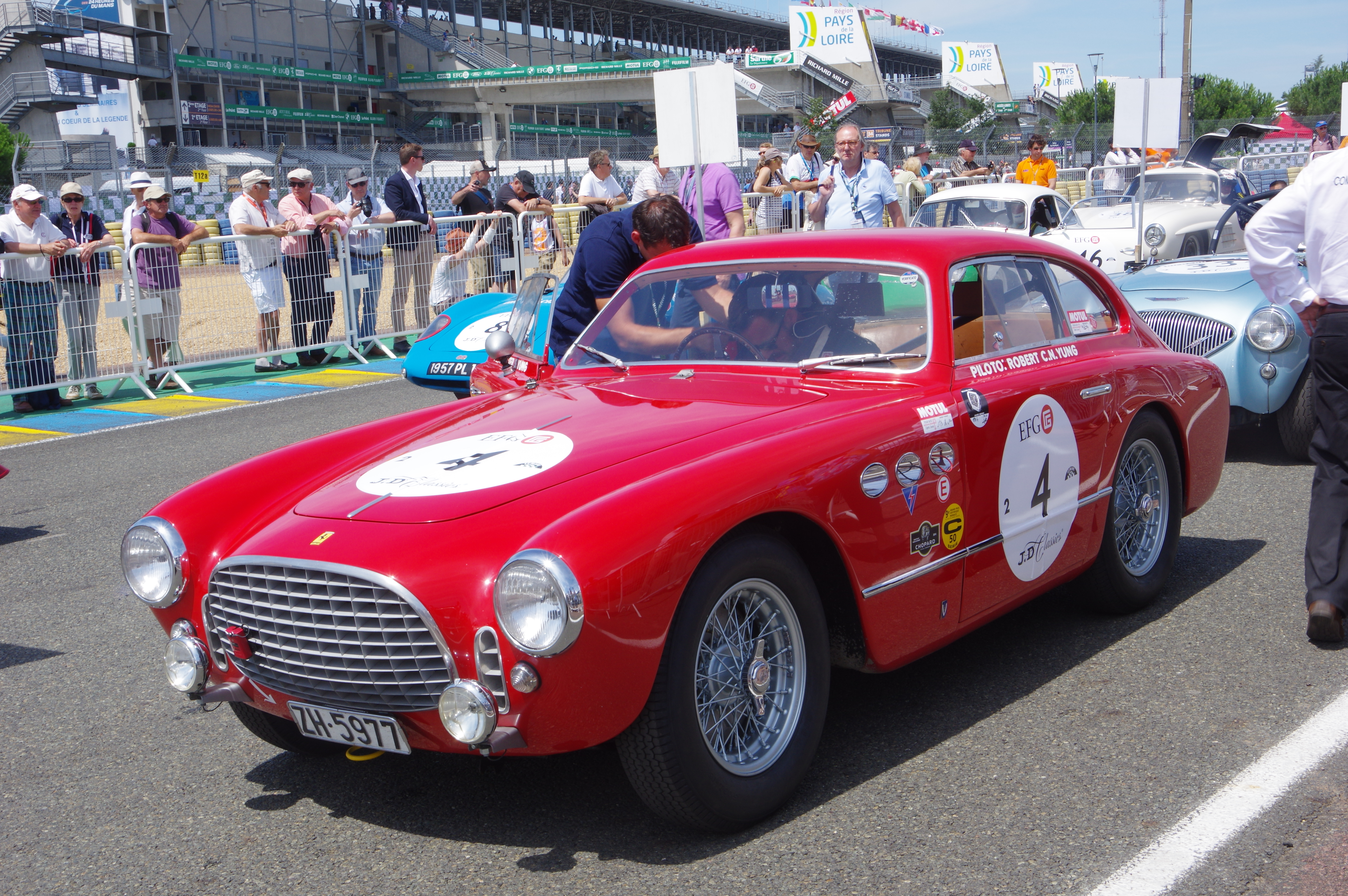 Le Mans Classic 2016